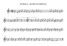 Gabon kanta